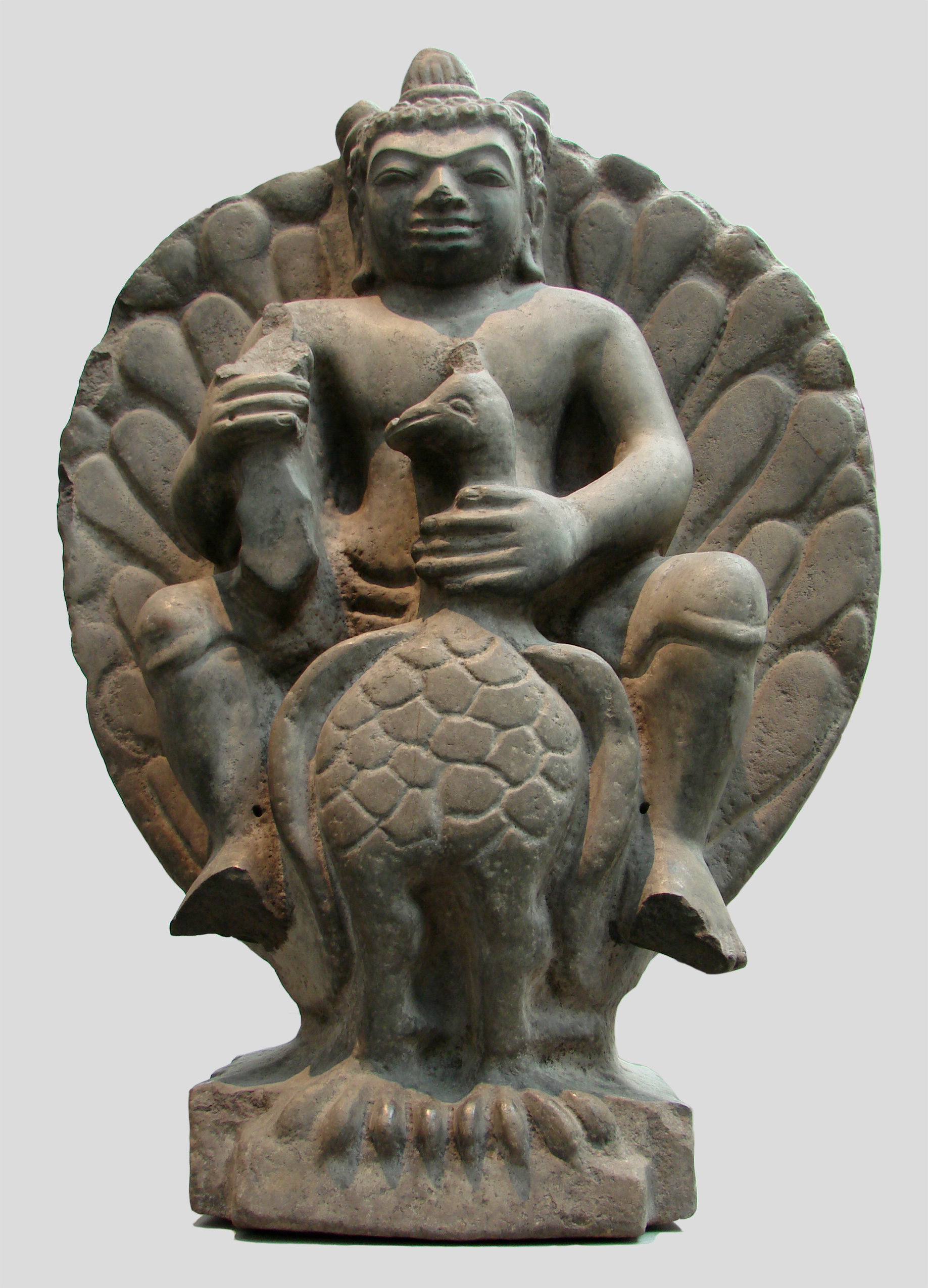 Skanda sur sa monture, le paon Paravani.Cambodge, province de Prei Veng, Kdei Ang, 7ème ou 8ème siècle, grès. Musée Guimet,Paris.